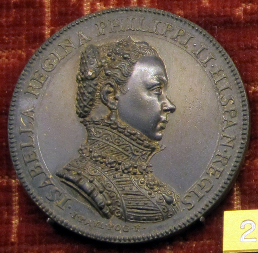 Isabel de Valois, Reina consorte de las Españas y las Indias, esposa de Felipe II.